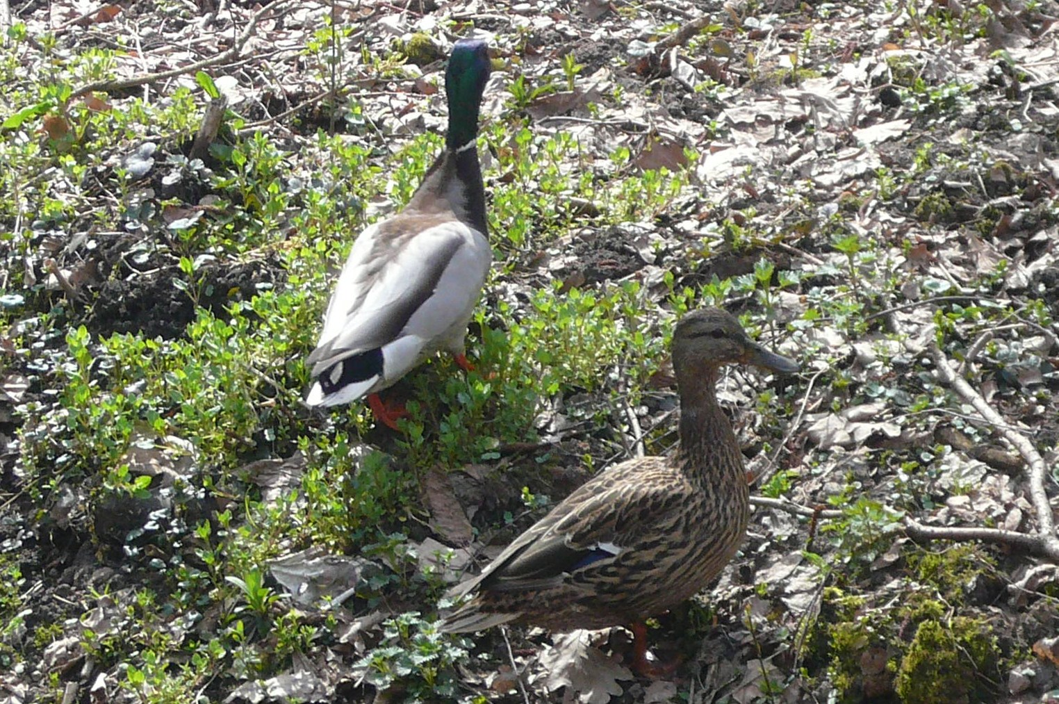 Para krzyżówek na terenie leśnym nad kanałem w Lesie Bemowskim